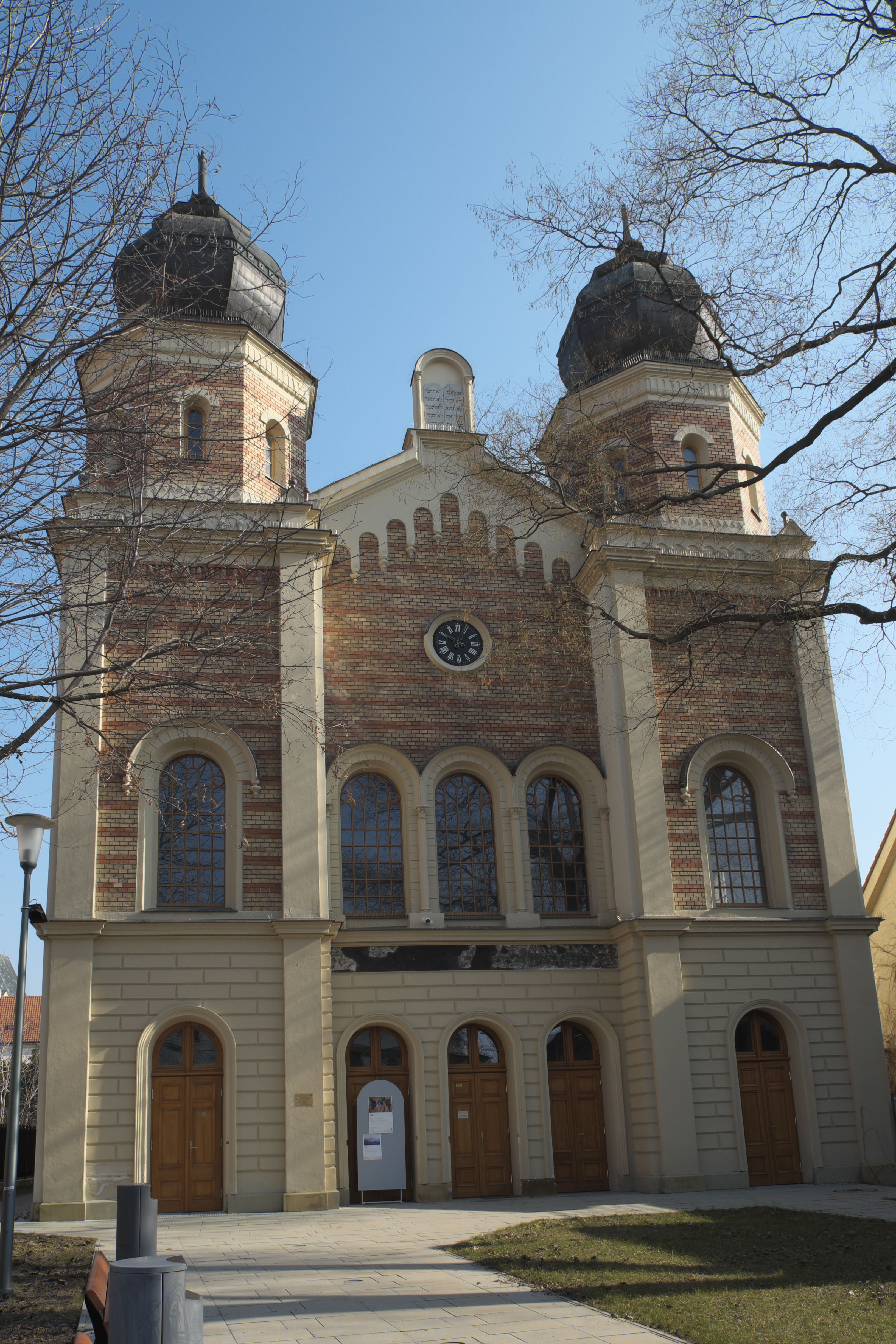 Ehemalige Synagoge Status Quo Ante, Halenárska 2, in Trnava (Slowakei)